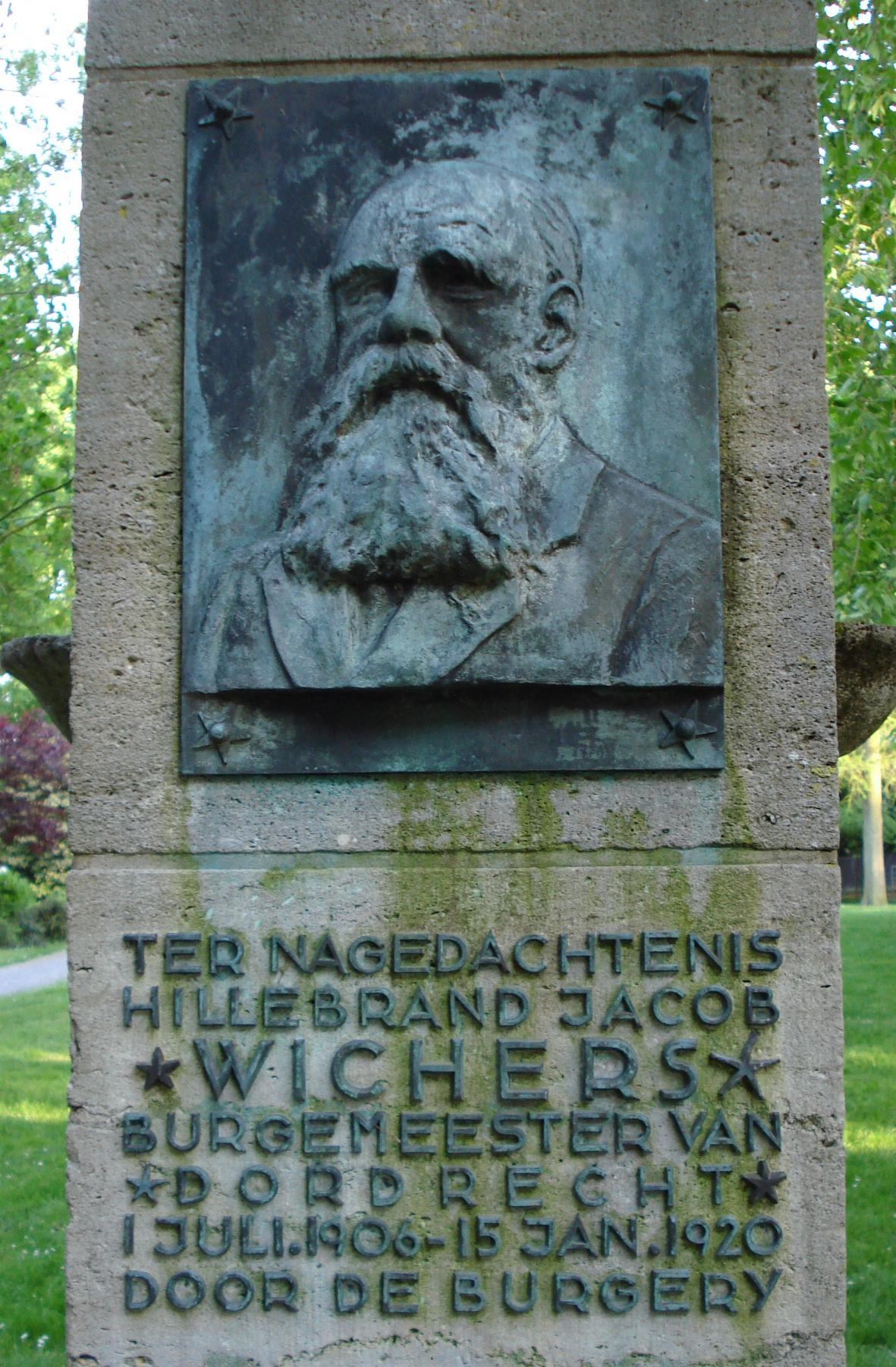 Dordrecht, Park Merwestein. Monument "Burgemeester Wichers" van Eduard Cuypers. Dordrecht/The Netherlands. FOP.